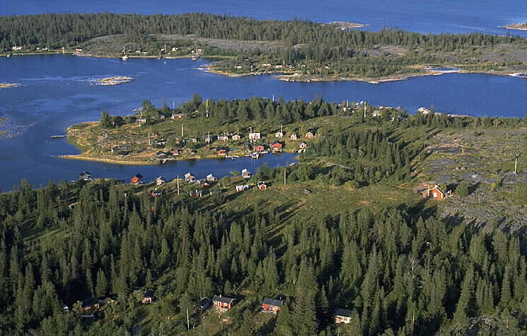 Motiv: Småskären Nyckelord: Flygbilder, Riksintressen Kategori: FiskelägeSmåskären